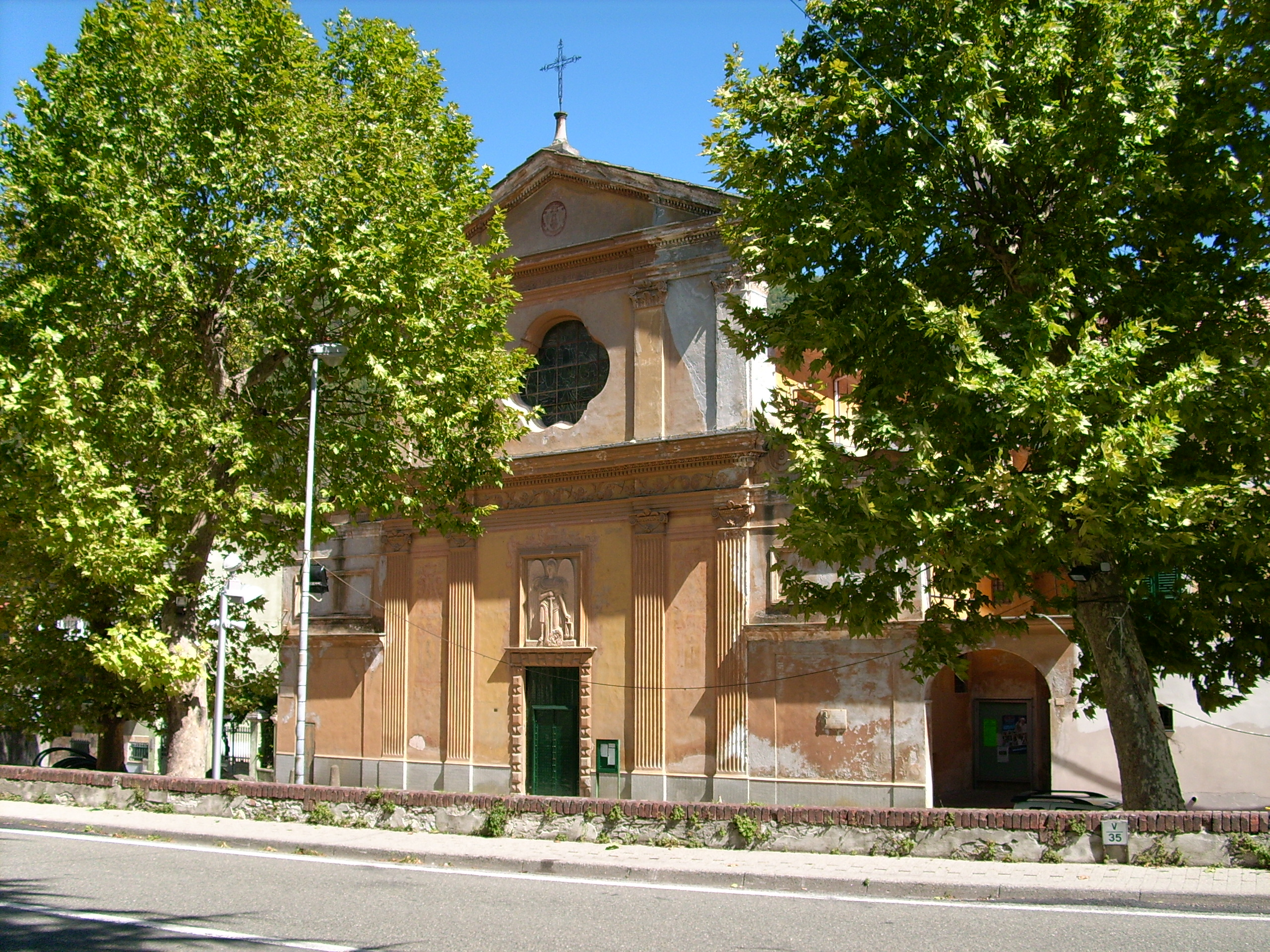 Chiesa di san Michele Arcangelo di Isola del Cantone, Liguria, Italia